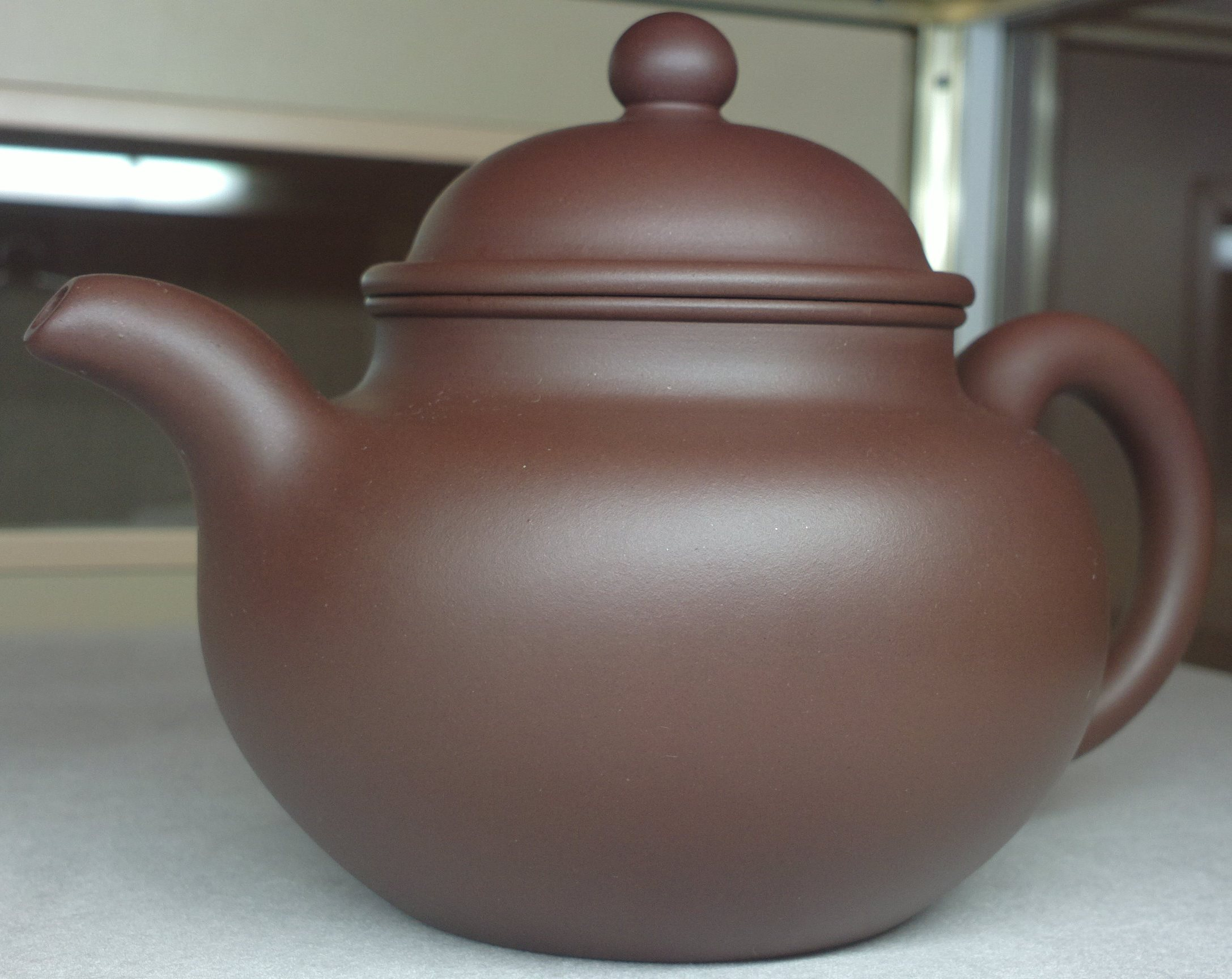 Théière Duoqiu en argile de Yixing ou glaise zisha par Zhou Guizhen. Exposition au Centre culturel de Chine à Paris du 4 au 13 septembre 2013.